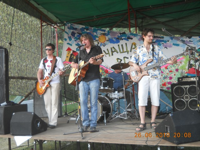 Группа "Река" на фестивале "Чаща всего"